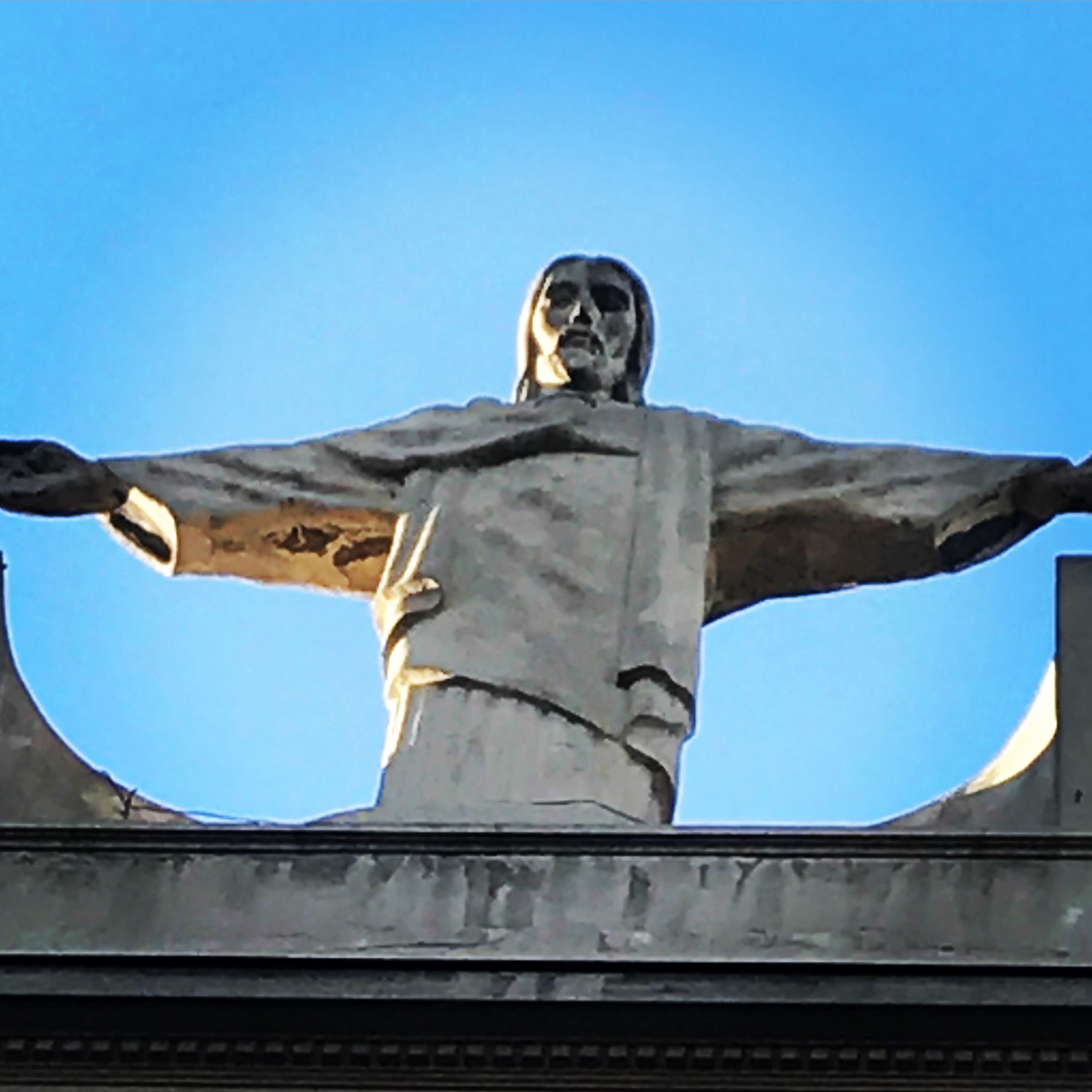 Cristo de la Fachada de la Casa Central de la Universidad Católica en Santiago de Chile.